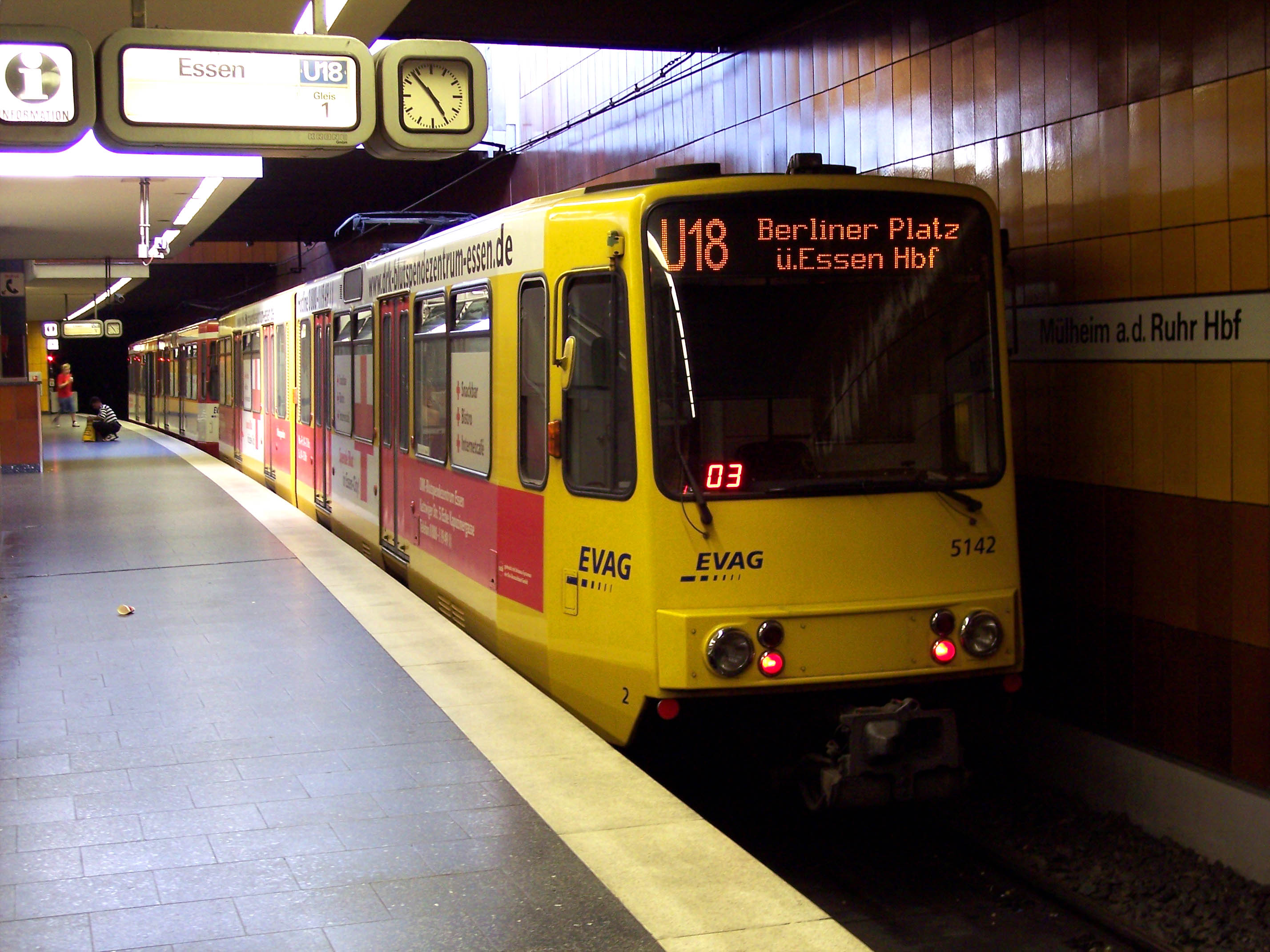 DUEWAG-built Stadtbahnwagen B light rail car 5142 of Essener Verkehrs-AG, Essen at Mülheim Hbf station.